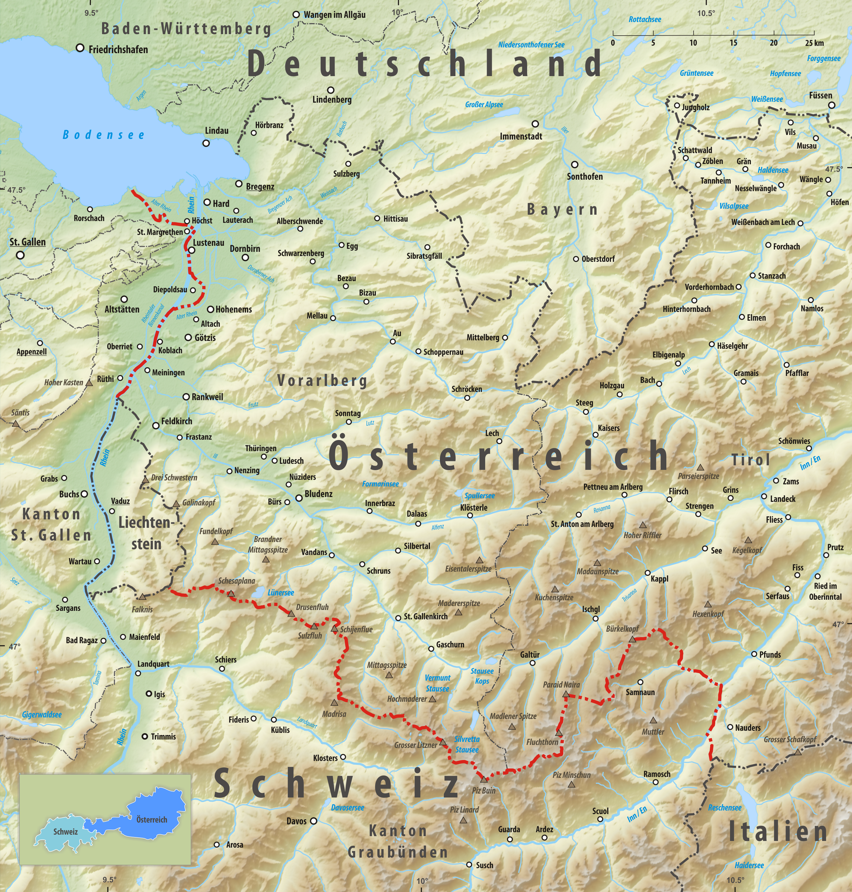 Reliefkarte des Grenzverlaufes zwischen der Schweiz und Österreich Topographischer Hintergrund: NASA Shuttle Radar Topography Mission (public domain). SRTM3 v.2.